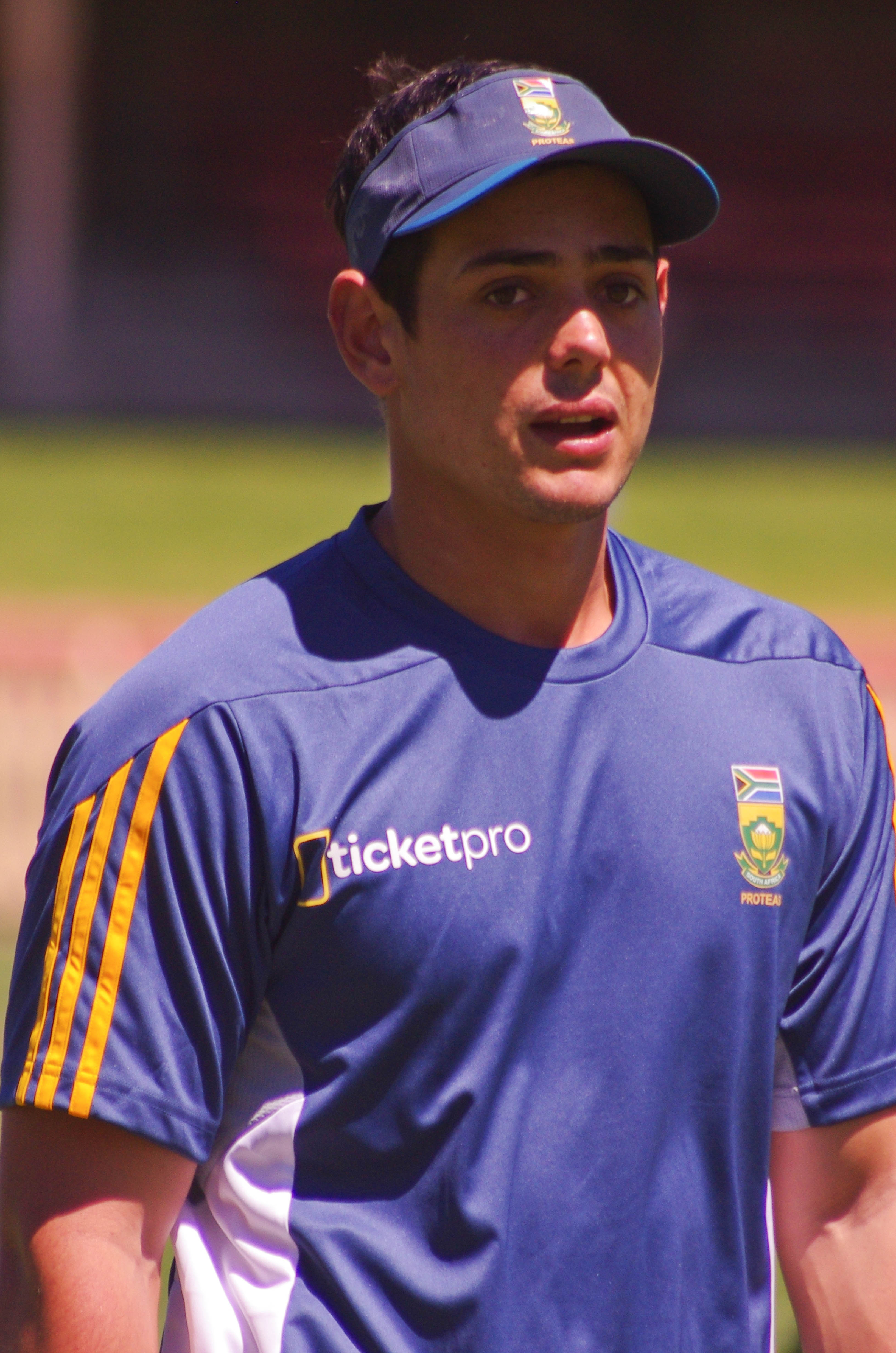 QUINTON DE KOCK